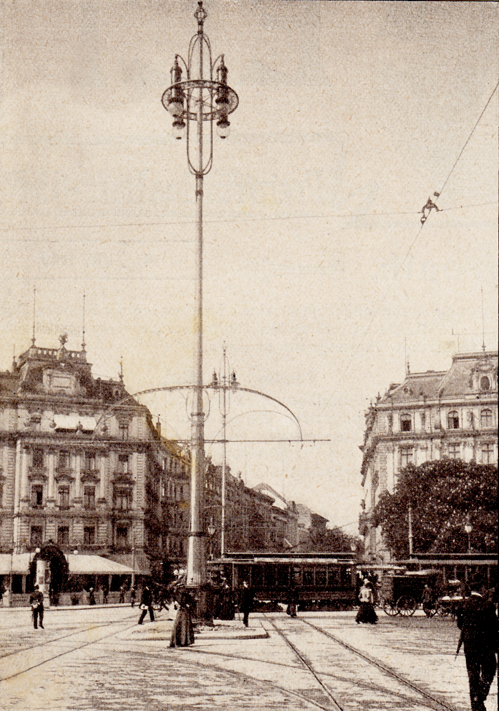 Kandelaber („Intensivflammenbogenlampen-Lichtmast-Paar“) auf dem Potsdamer Platz in Berlin; 1905 nach Entwurf des Architekten Emil Högg ausgeführt durch die Berliner Kunstschmiedewerkstatt Schulz & Holdefleiss; nicht erhalten